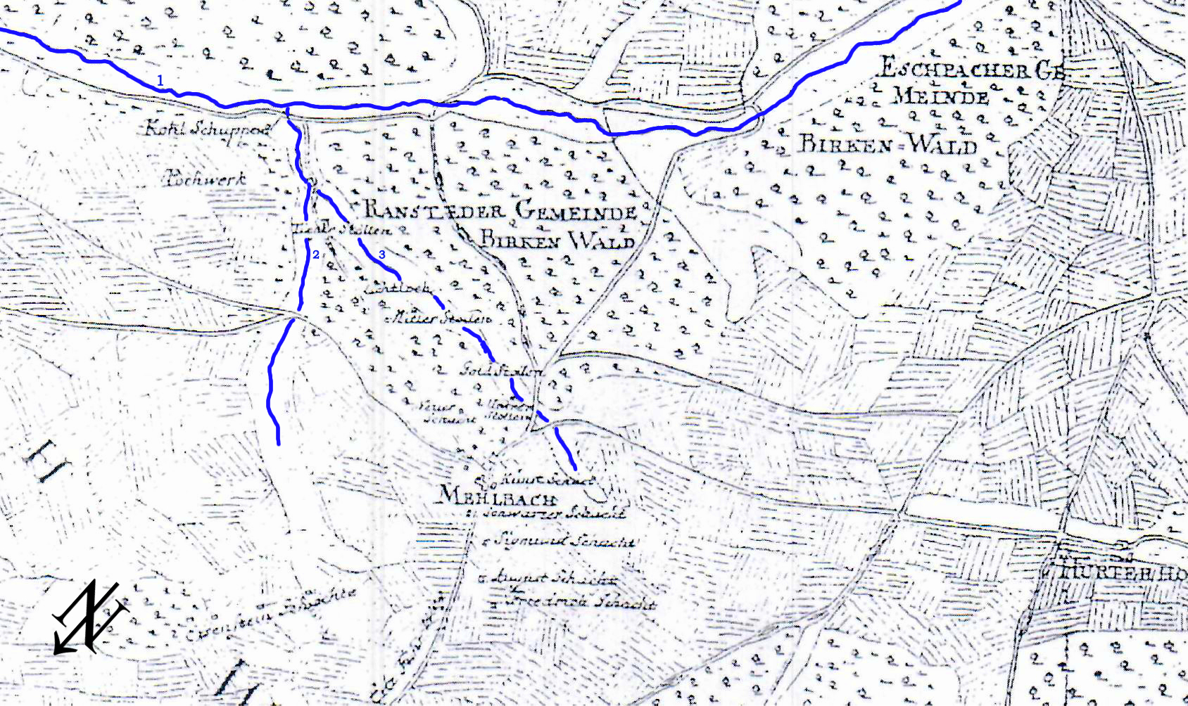 Grube Mehlbach bei Weilmünster, Situation 1763. Karte nicht genordet. Nachträgliche Einzeichnungenː Nordpfeil links unten, Wasserläufe koloriertː 1= Bleidenbach, 2= Mehlbach, 3= Saure Mehlbach.